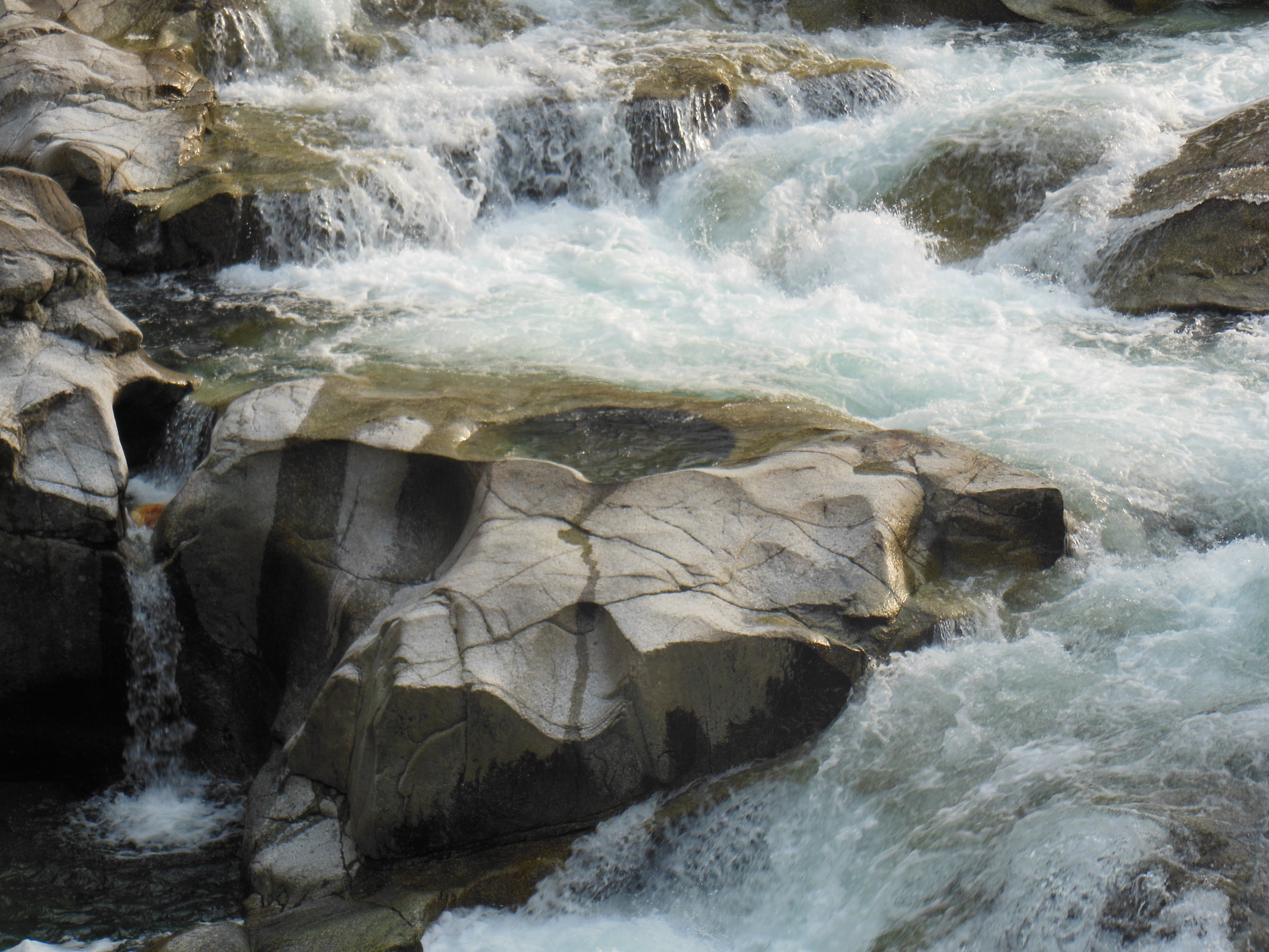 愛知県北設楽郡東栄町の大千瀬川にある「煮え渕ポットホール」（甌穴）。